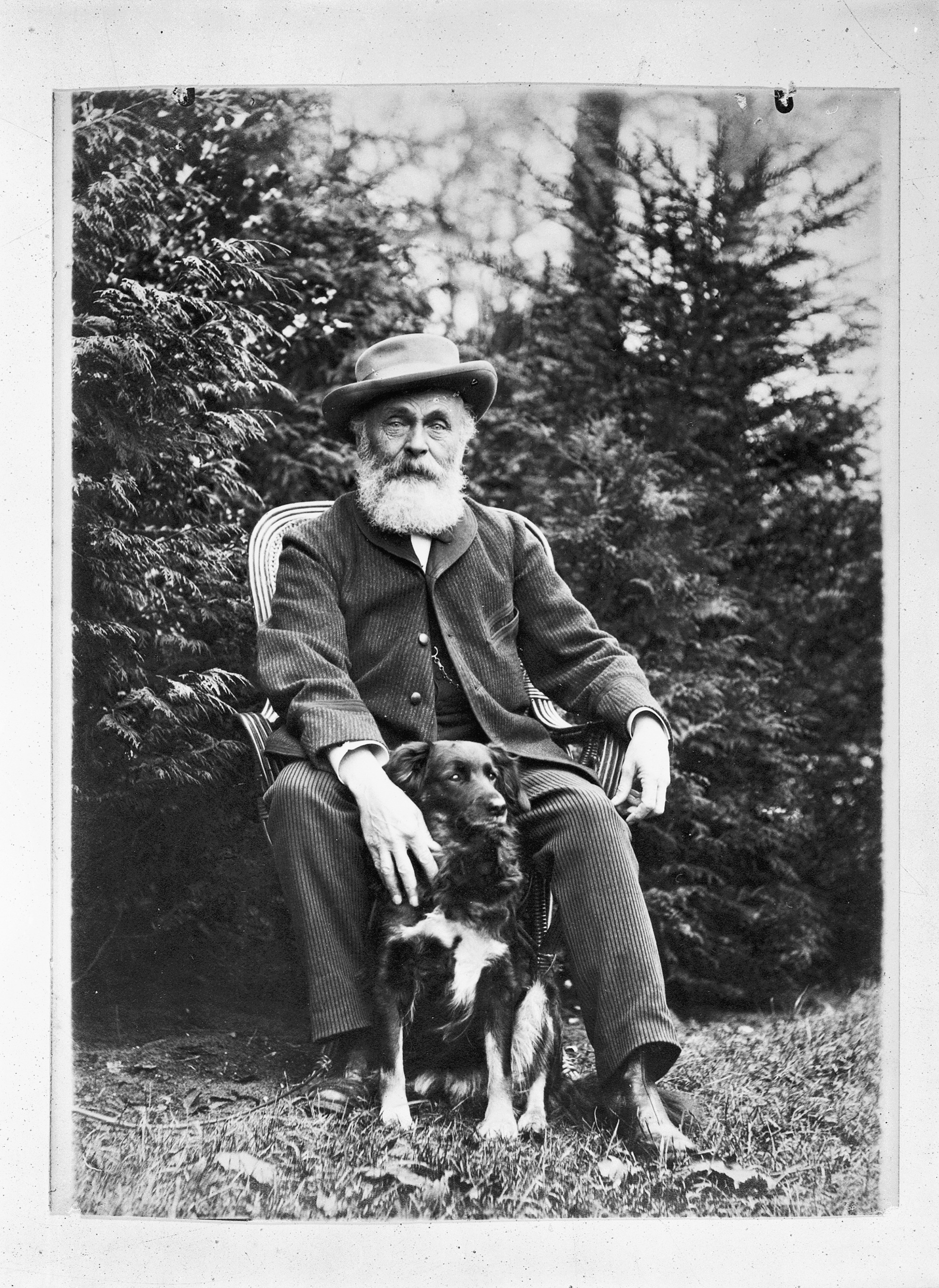 Portret van tuinarchitect Louis Paul Zocher, zittend met hond